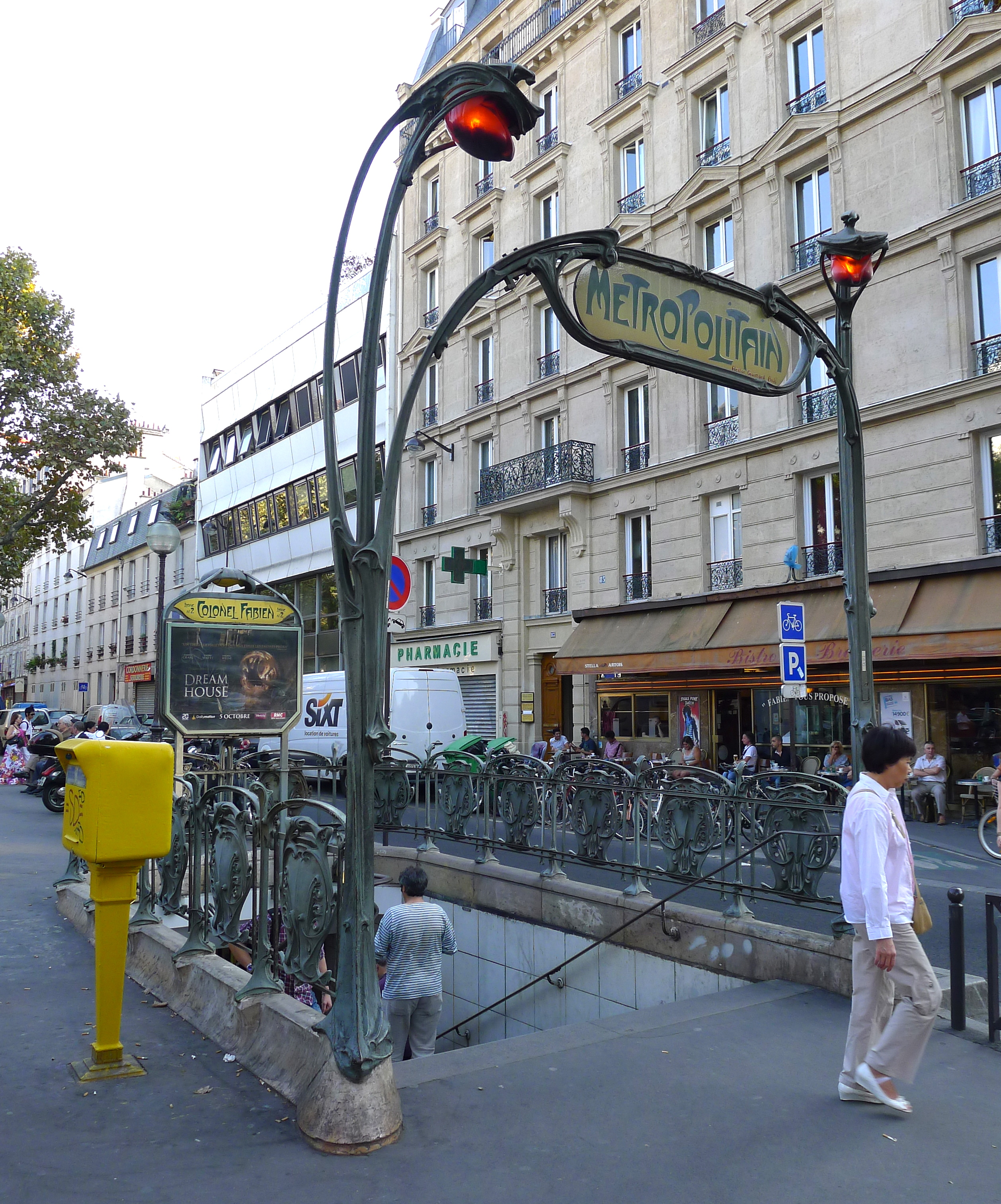 Édicule Guimard de la station Colonel Fabien